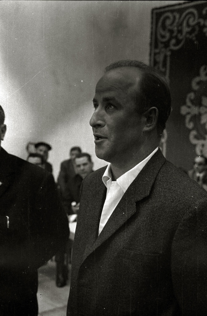 Título original: Campeonato de bertsolaris celebrado en el frontón Anoeta (10/17) Localización: San Sebastián (Guipúzcoa)